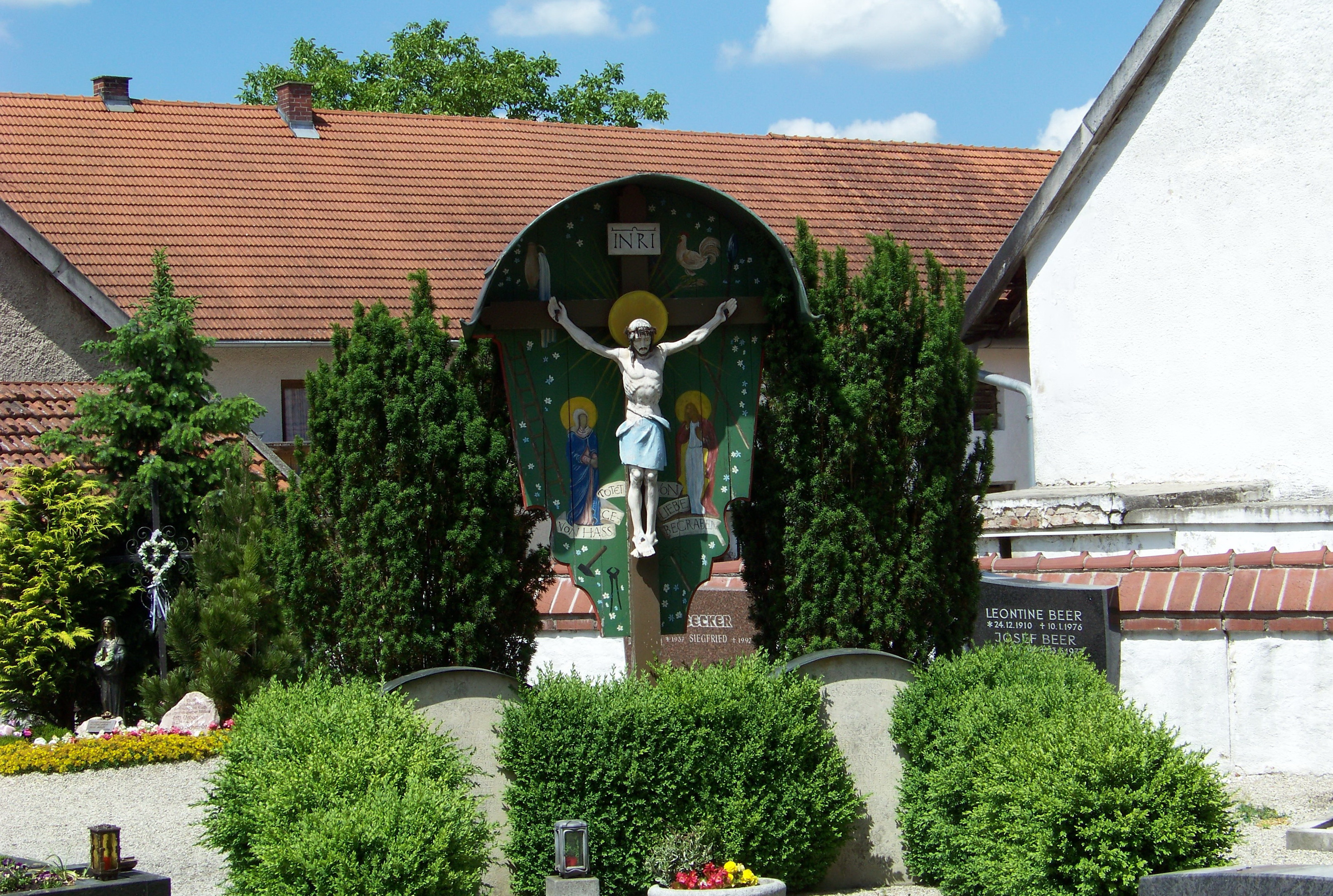 Landshut, Münchnerau, Kath. Kirche St. Petrus; spätromanischer Chorturmbau, 12./13. Jh.; mit Ausstattung. Im Friedhof Arma Christi Kreuz mit Darstellung der Leidenswerkzeuge.